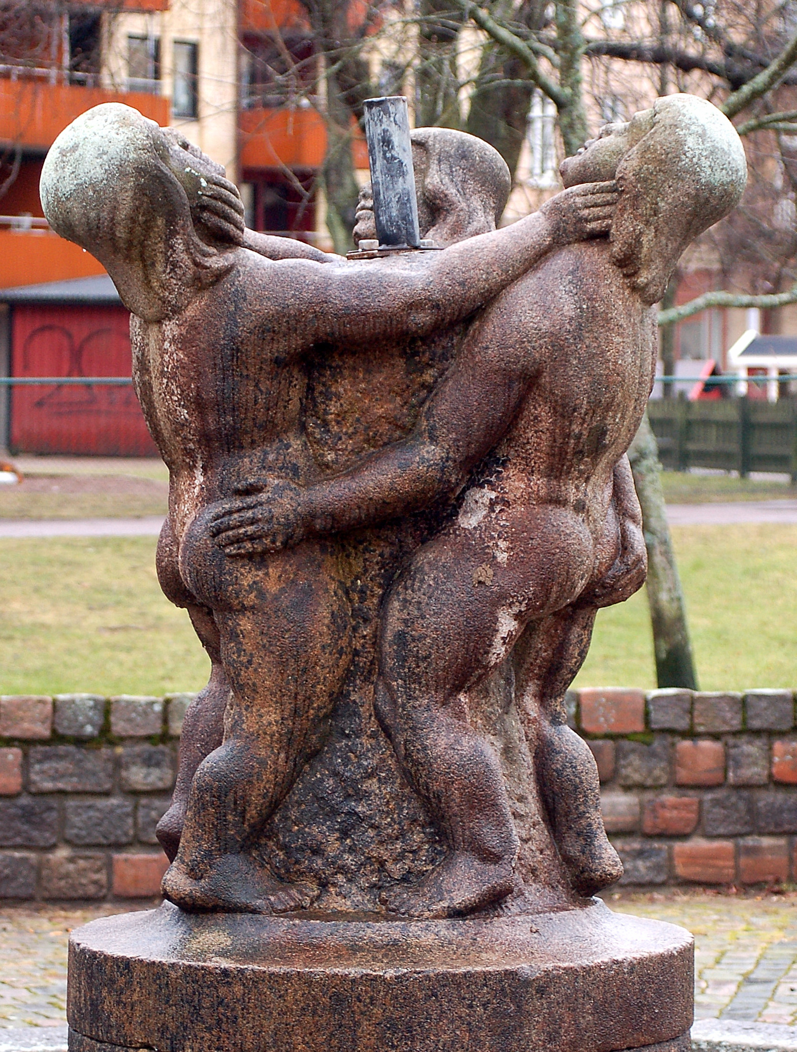 Skulpturen och fontänen "Lekande barn" från 1920 av Oscar Johannesson placerad i Herrhagsparken Karlstad